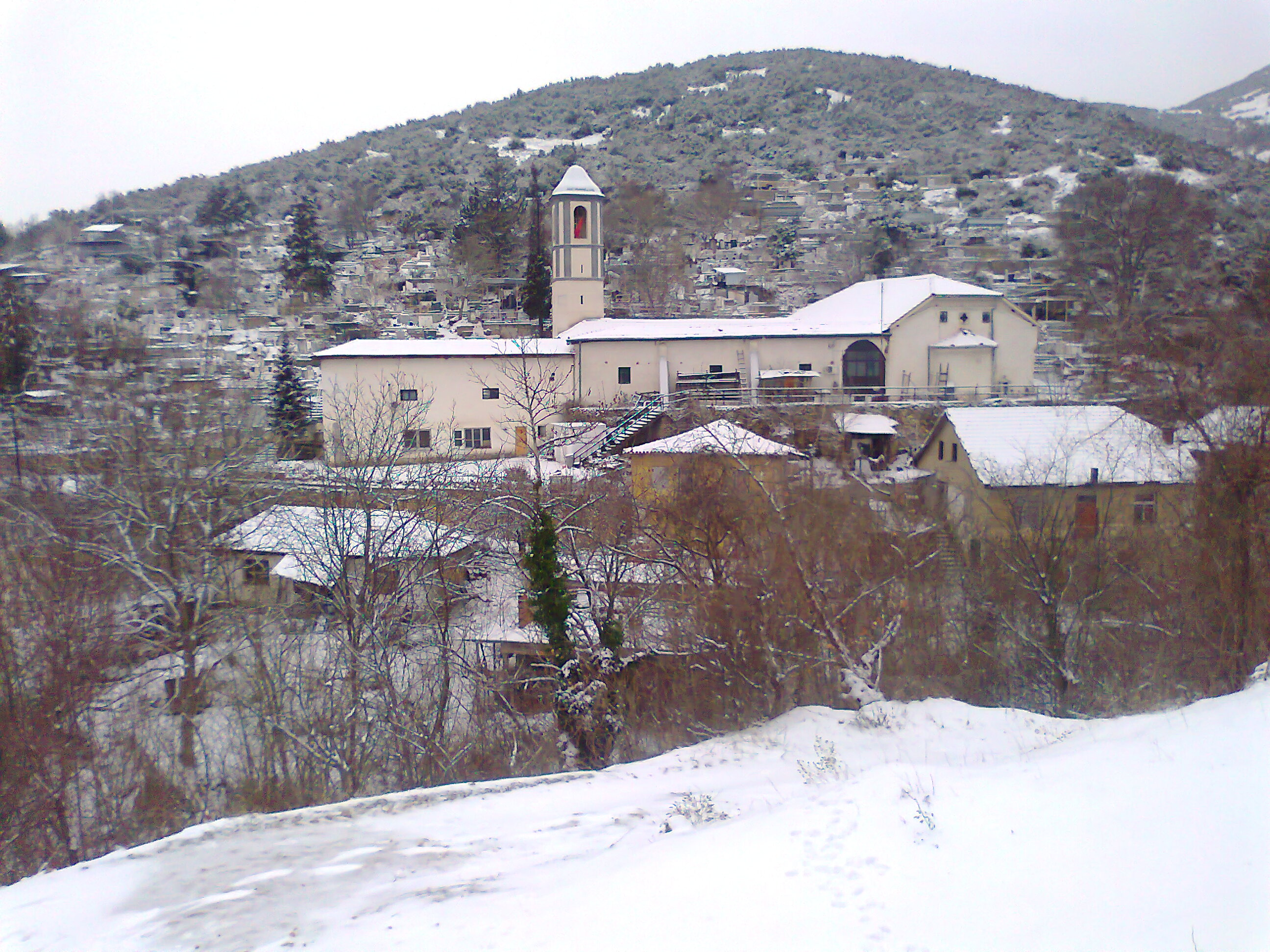 St. Demetrius church in Valandovo